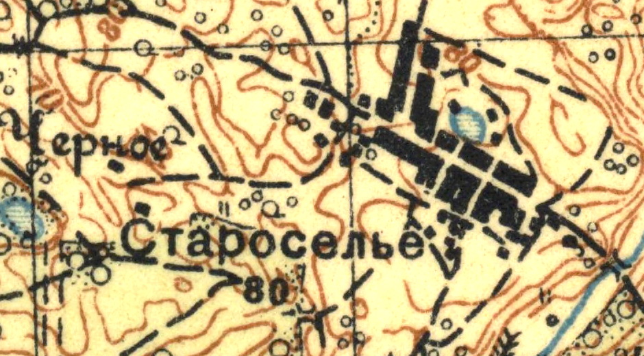 Топографическая карта Ленинградской области, квадрат О-36-15-А (Шапки), деревня Староселье